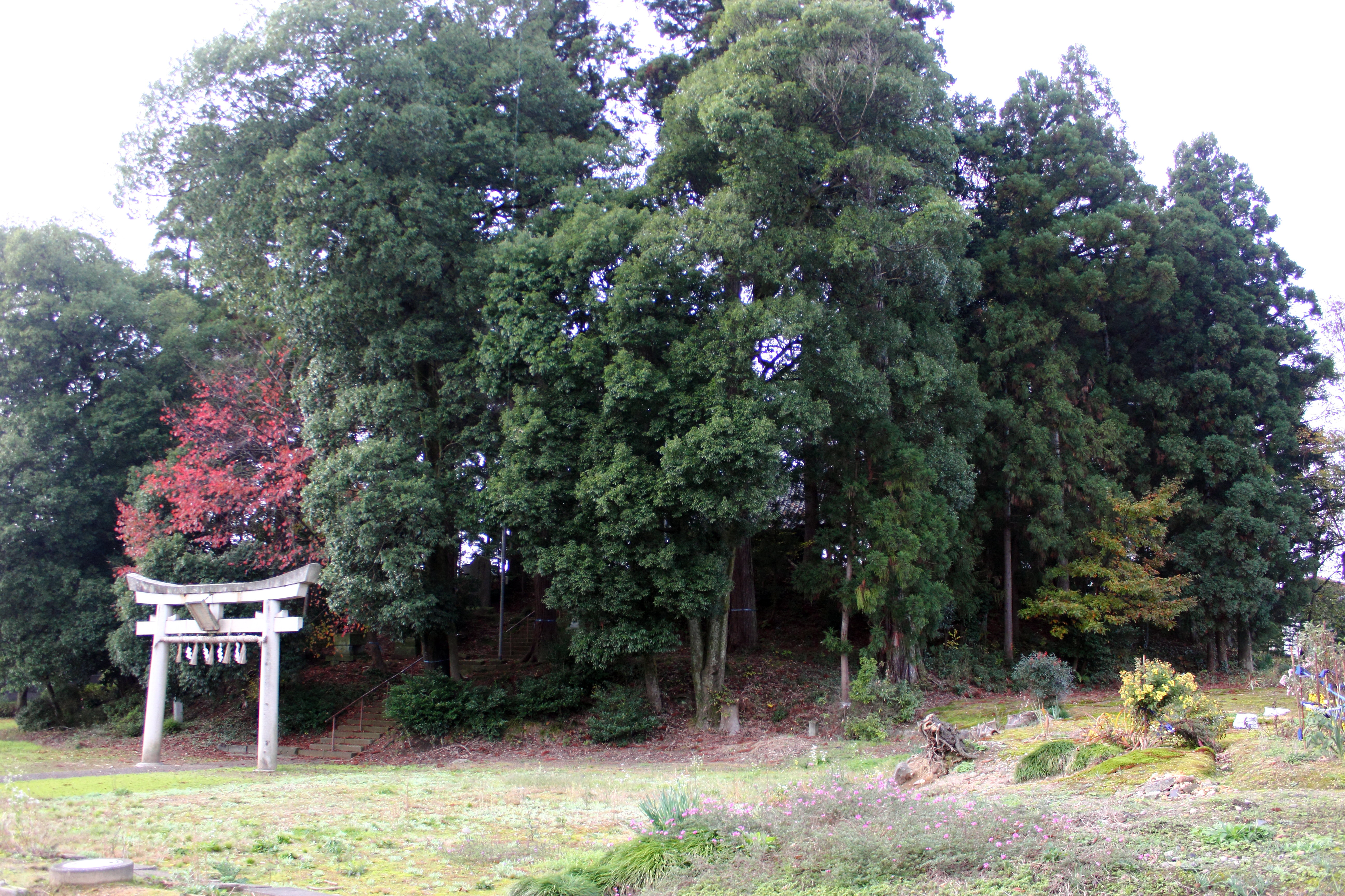 兜山古墳（鯖江市）